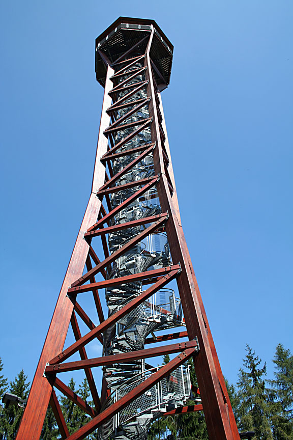 Teltschik Tower, Wilhelmsfeld